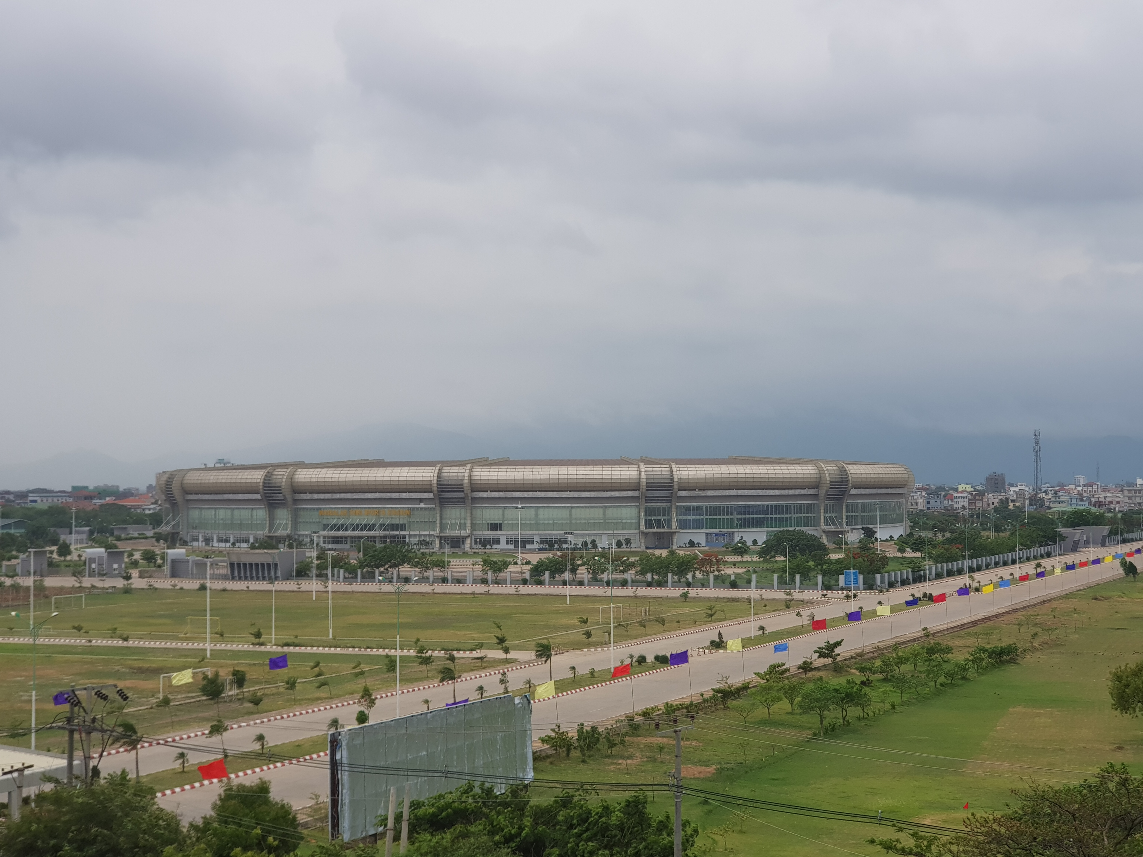 မြန်မာဘာသာ: မန္တလာသီရိဘက်စုံအားကစားဝင်းအတွင်းမှ မန္တလာသီရိအားကစားကွင်း